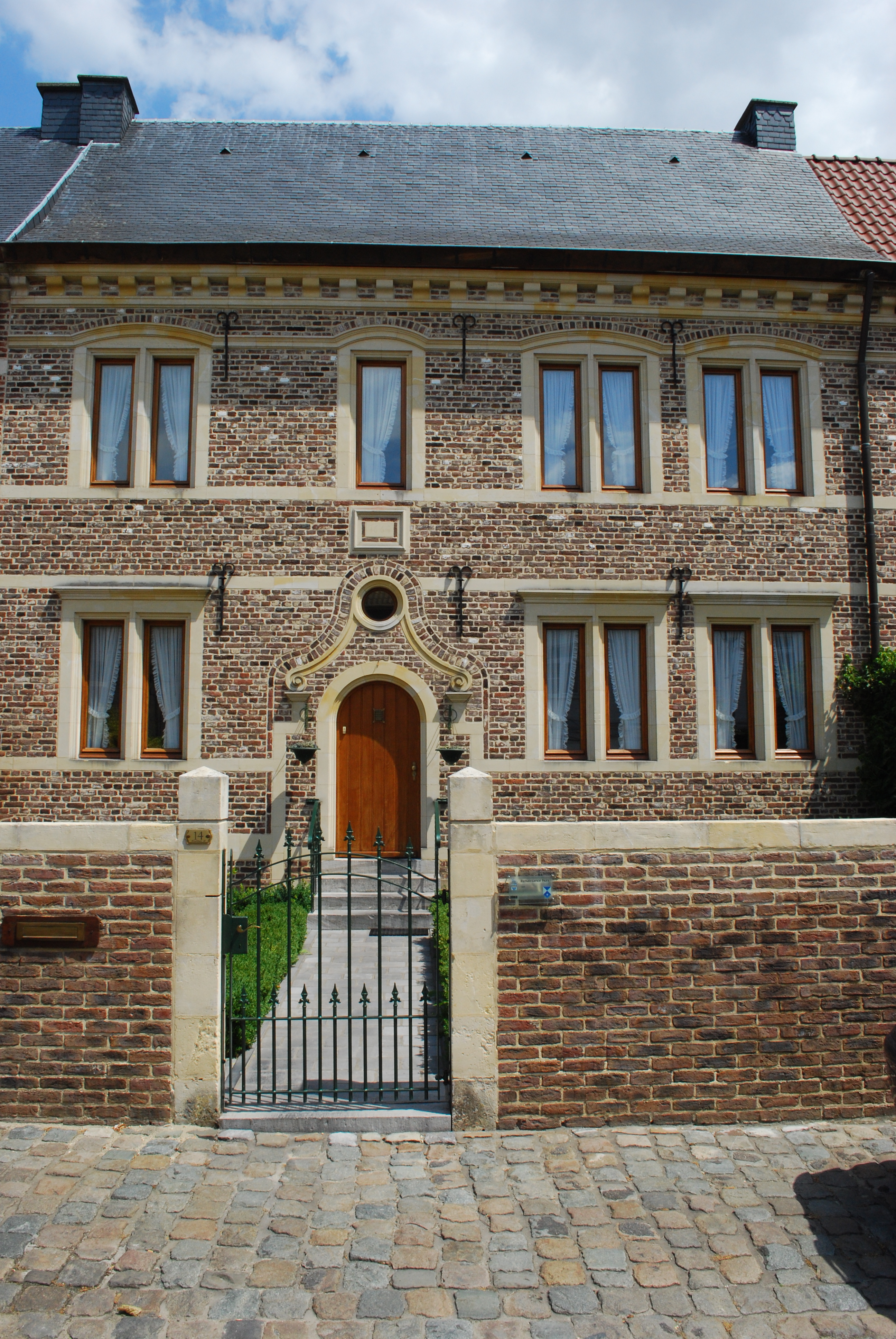 Le béguinage de Tongres : Onder de Linde, n° 14. Maison millésimée en façade 1666. Façade assez fortement remaniée dans la decennia 1980 (cf. photo sur le lien ci-haut).